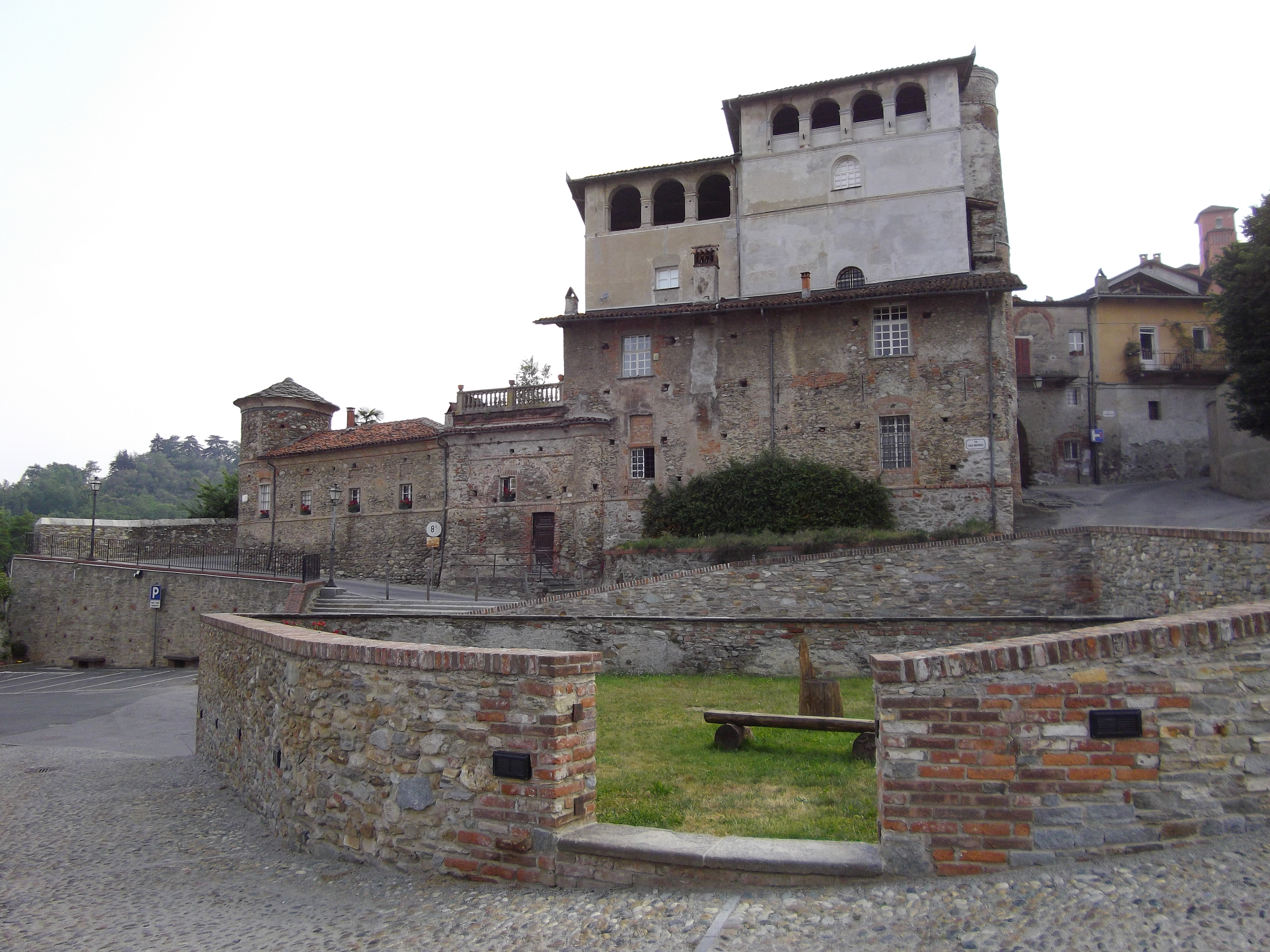 Piemontèis: 'L Castlòt 'd Costiòle